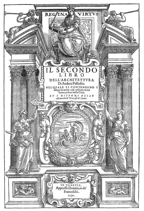 Frontispice du livre II des Quatre Livres de l'Architecture éd Venise